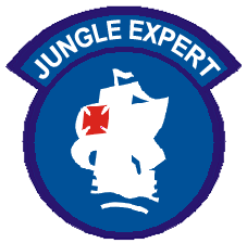 Diseño del parche de la Escuela de las Americas para los egresados del curso de supervivencia en la selva.